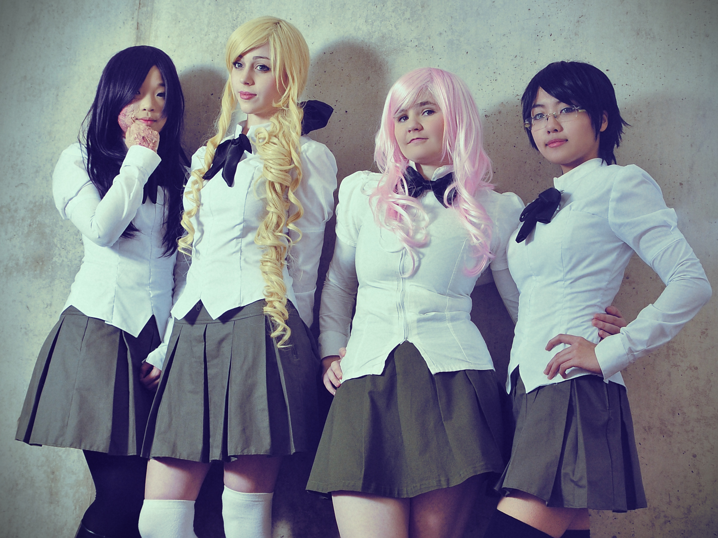 Katawa Shoujo